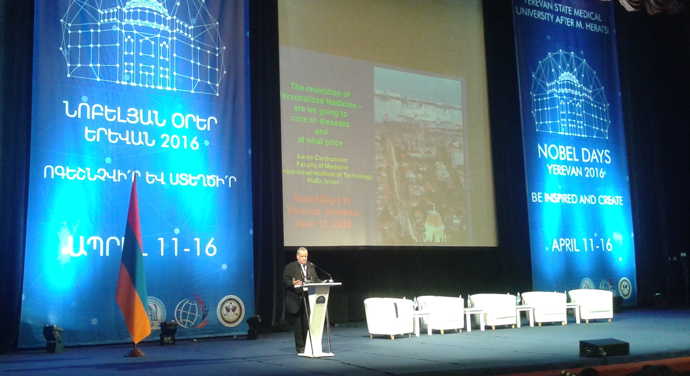 Ահարոն Չիխանովերը հանրային դասախոսության ժամանակ, Երևան